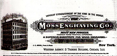 Moss Engraving Advertisement